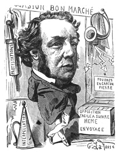 Portrait satirique de Ernest Picard.